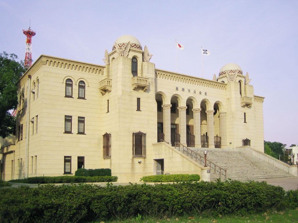 Toyohashi City Public Hall (豊橋市公会堂 Toyohashi-shi Koukaidou), Toyohashi, Aichi, Japan